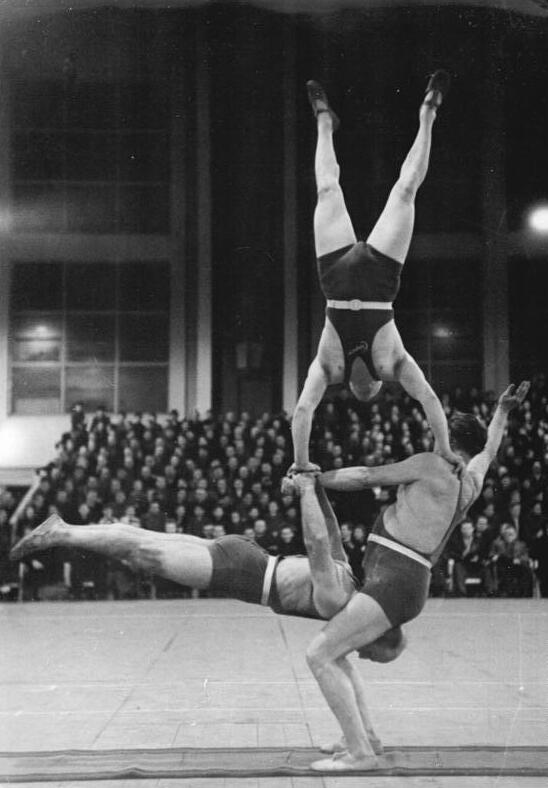 Leipzig, Akrobaten Zentralbild Rössing 1.2.1954 "Freiheit für Manfred von Brauchitsch". Unter diesem Motto stand eine Sportveranstaltung, die Ende Januar 1954 in der Messehalle 2 in Leipzig für den in Westdeutschland widerrechtlich eingekerkerten Patrioten durchgeführt wurde. UBz: Kunstkraftsport als kulturelle Umrahmung der sportlichen Wettkämpfe.